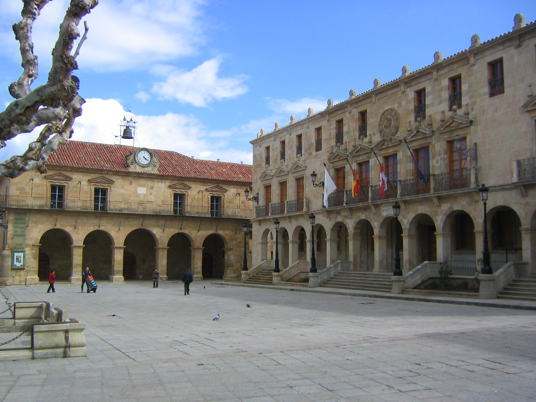 Plaza Mayor de Soria, Soria (Castilla León) (España).